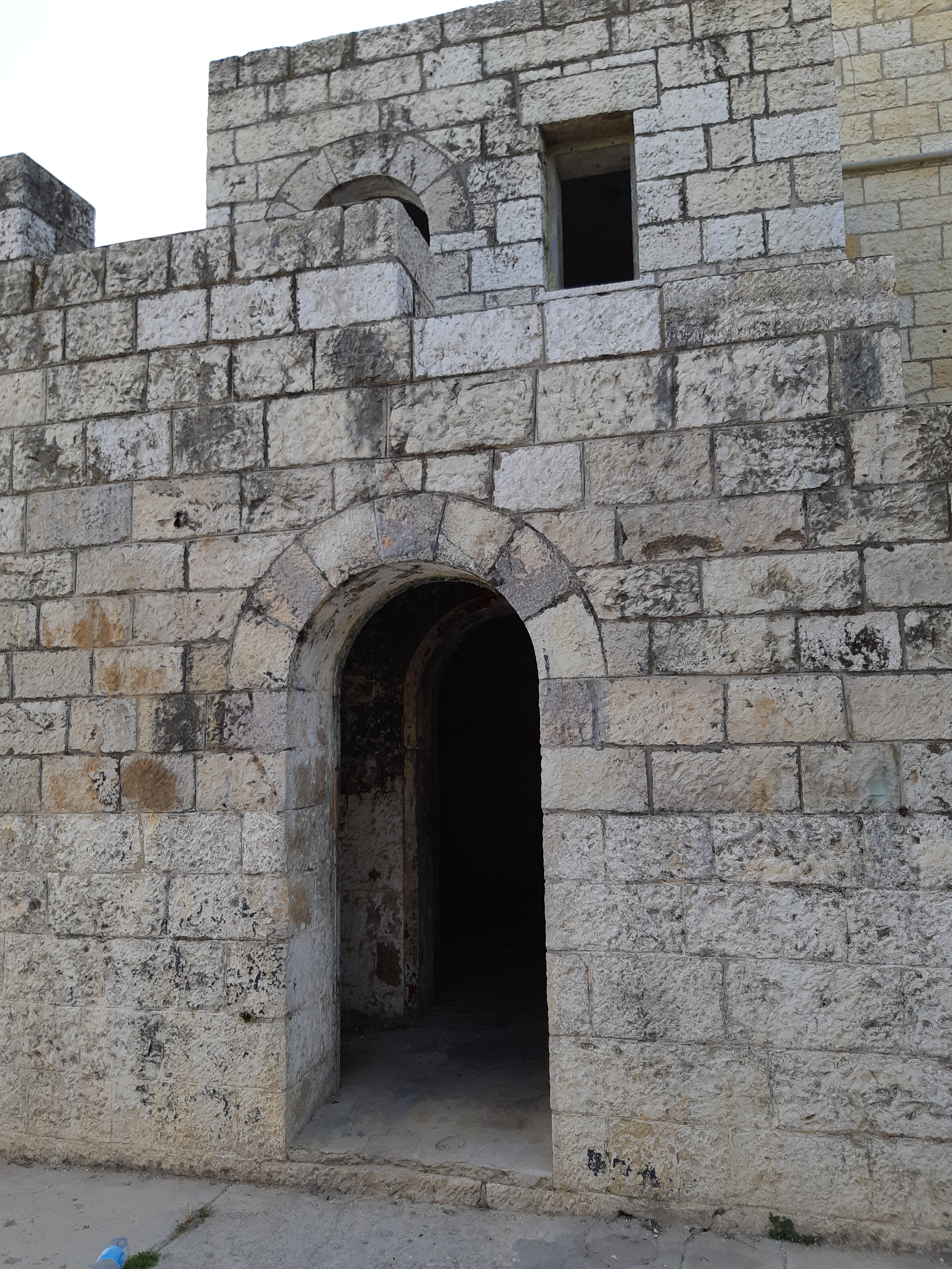 משטרת אבו גוש - שער סוסים